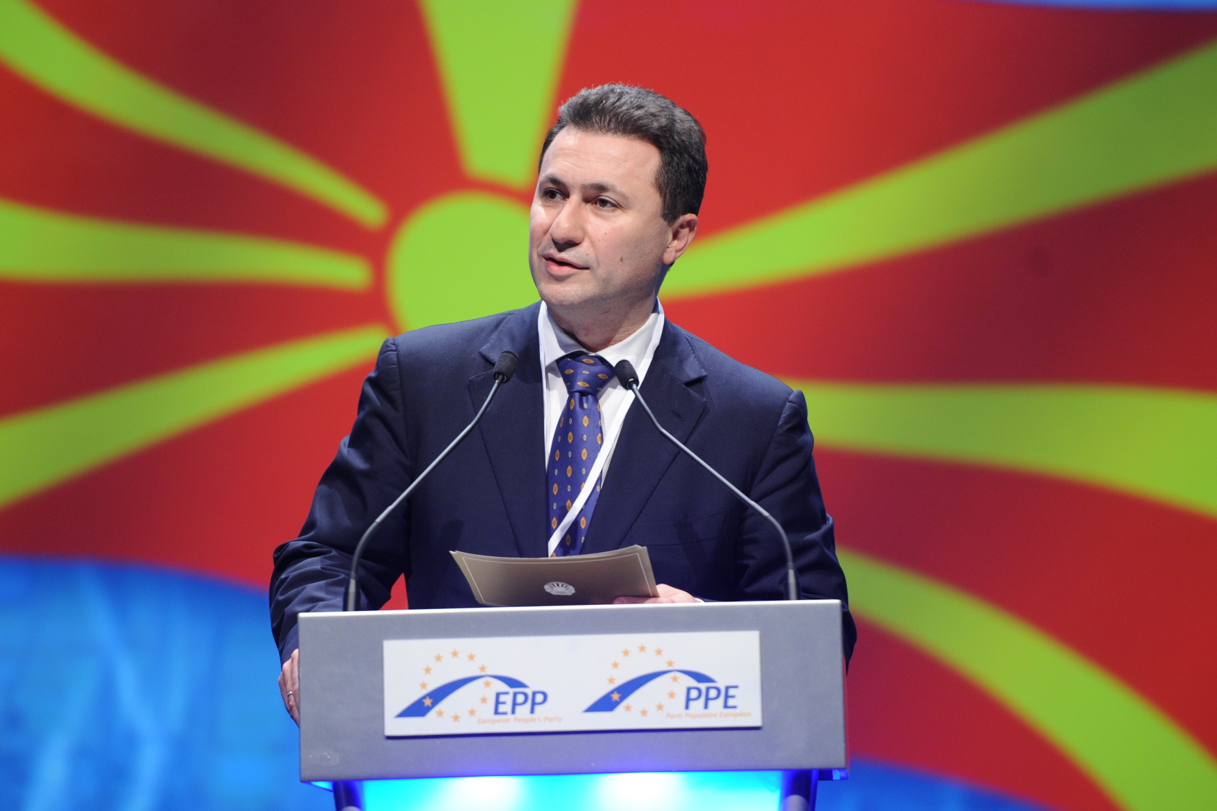 EPP Congress Marseille 5964